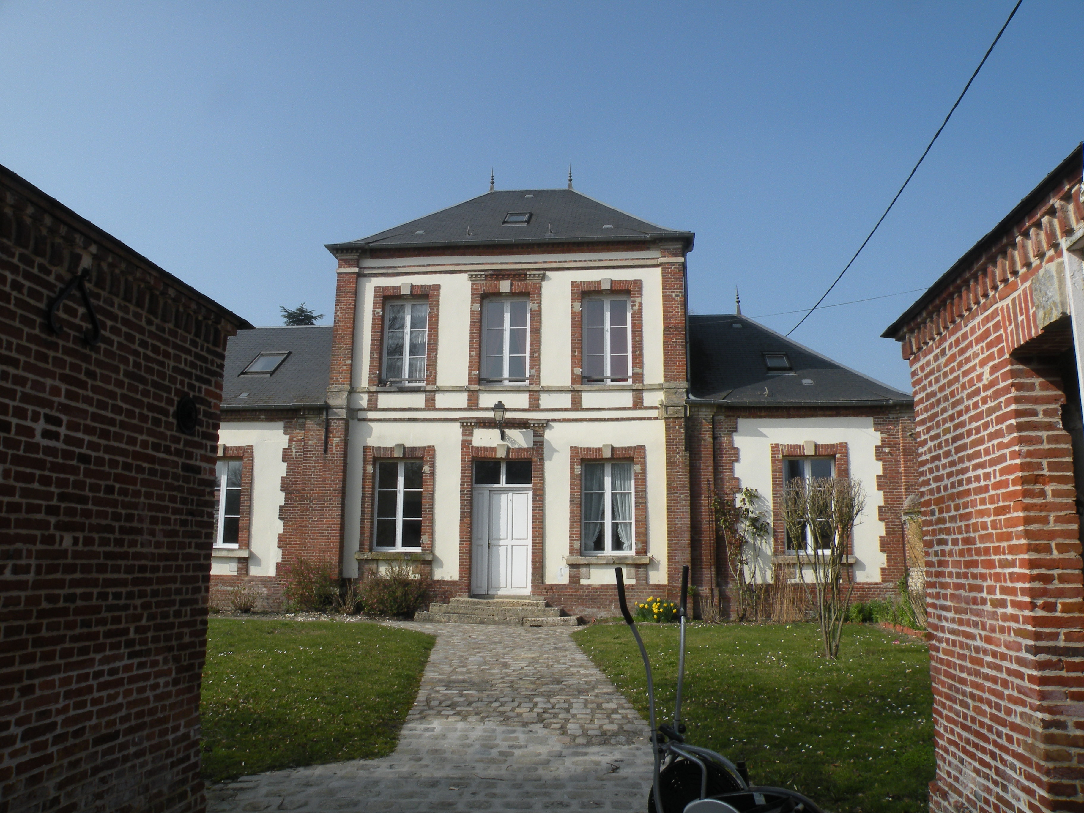 mairie de Boutencourt